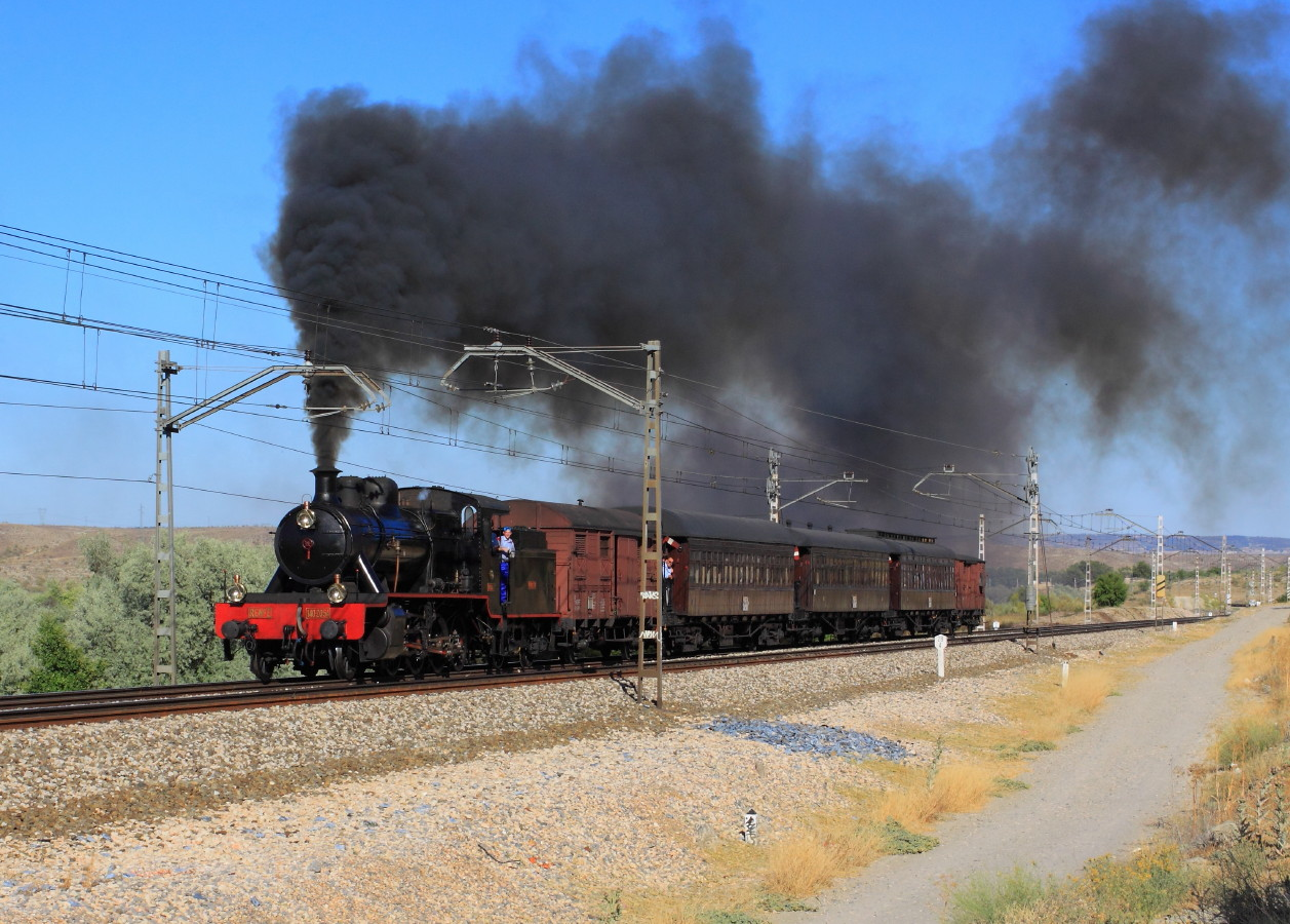 El Tren de la Fresa remolcado por la locomotora 140T "Guadix" a la antura de Pinto.